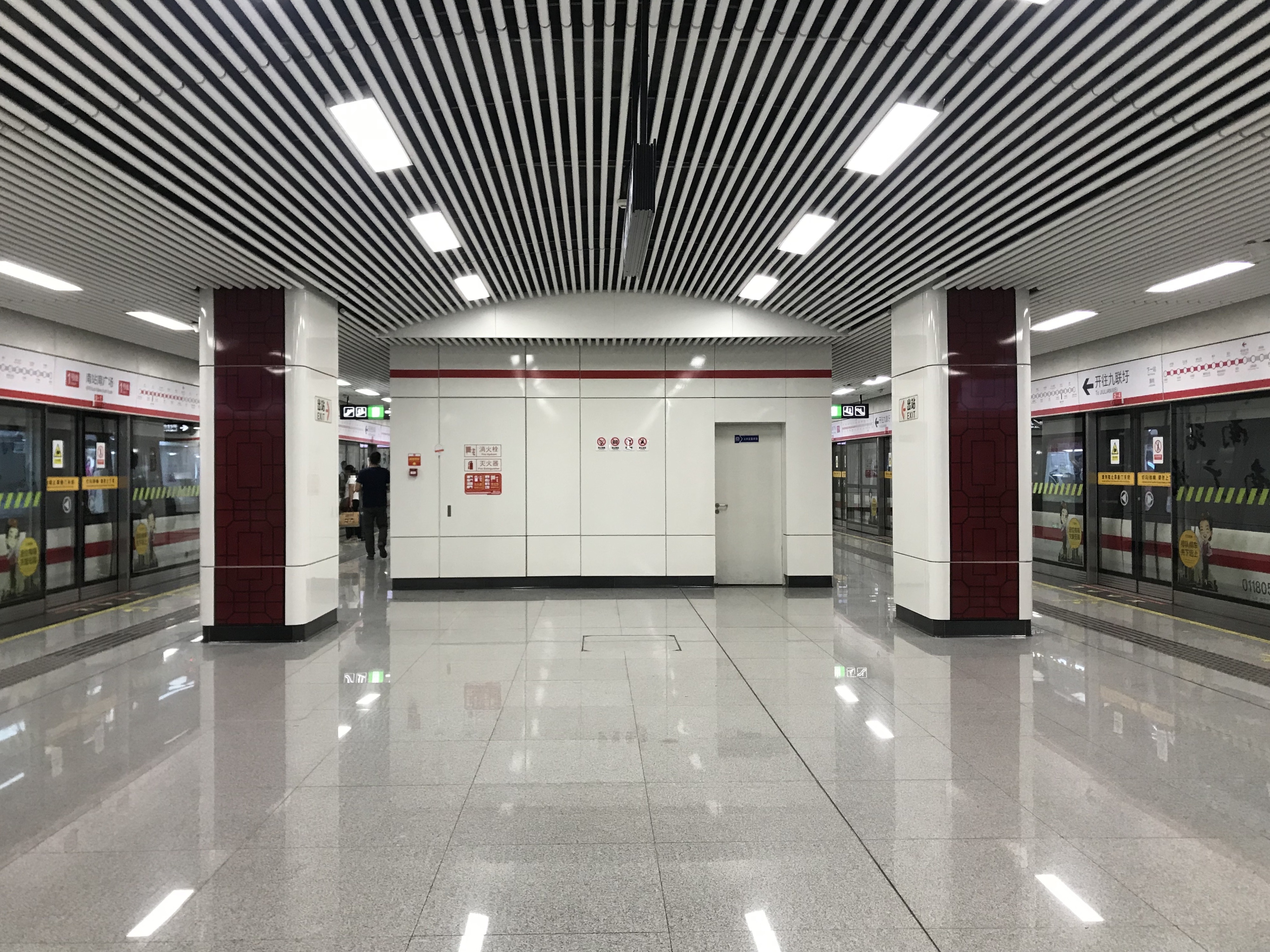 南駅南広場駅のホーム